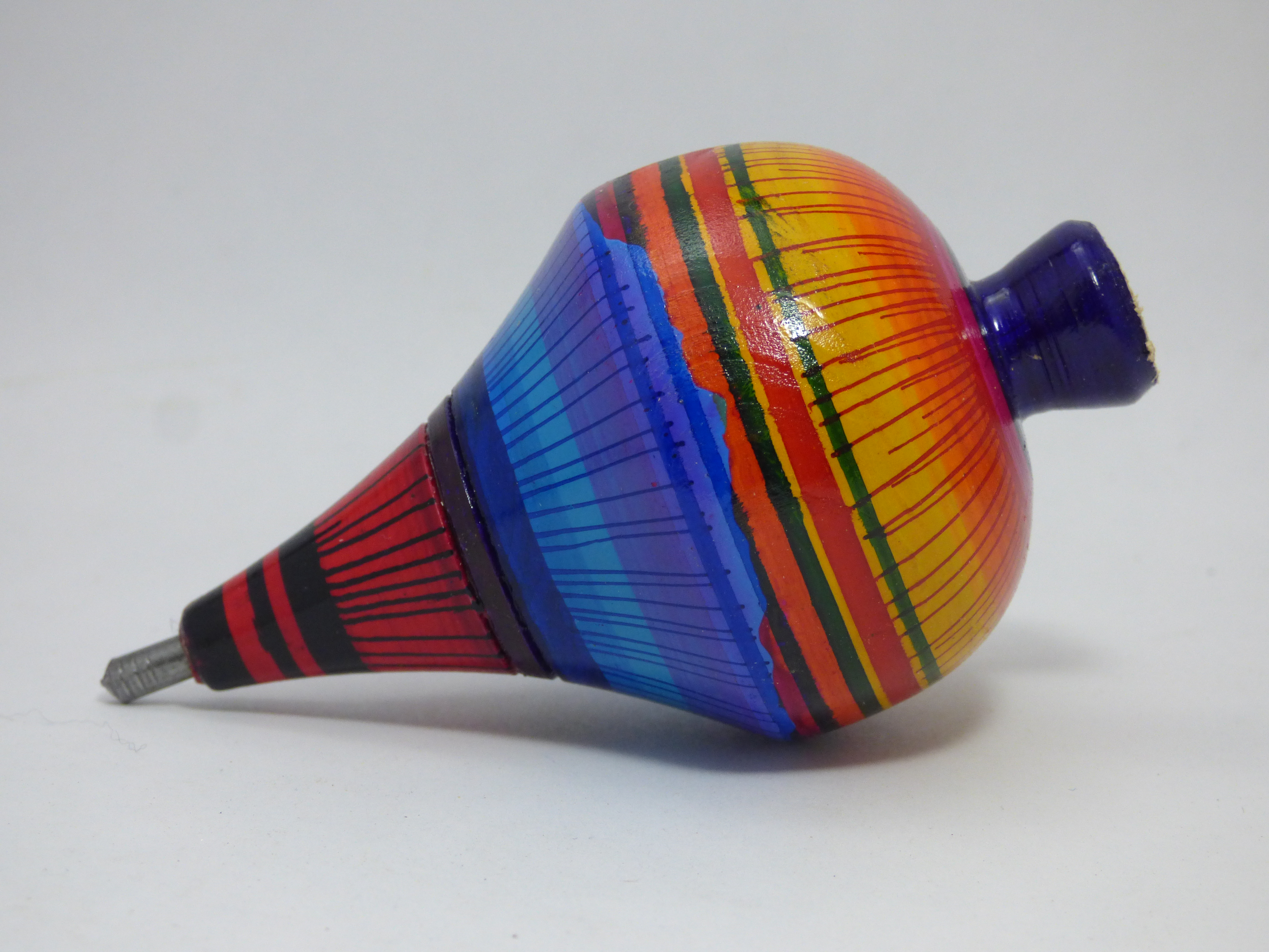 Juguetes del taller de Zenón Hernández en Teocaltiche, Jalisco